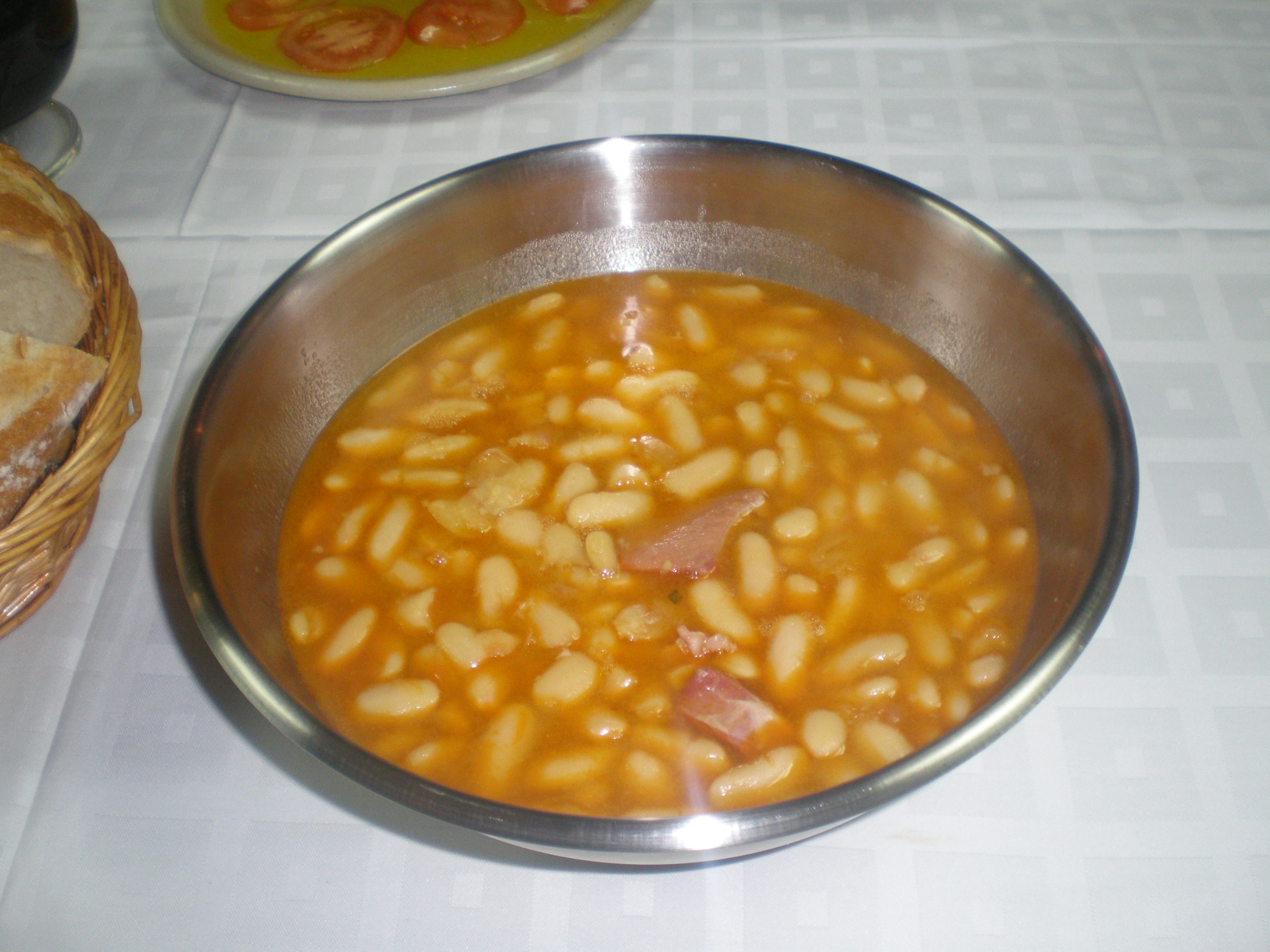 Fuente de fabada en la Sociedad Gastronómica El Rinconín, (Oviedo-España)